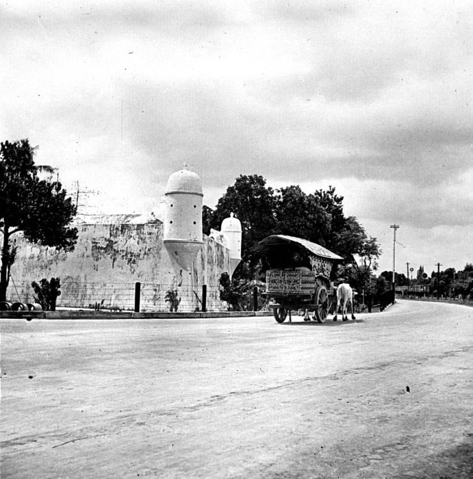 Repronegatief. Een koets passeert een hoektoren van de muren rond de kraton Yogyakarta